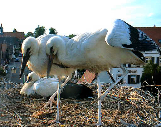 Storchenscheune Bornheim, Nest 1, die gerade flügge gewordenen Jungstörche beim „Paso doble“